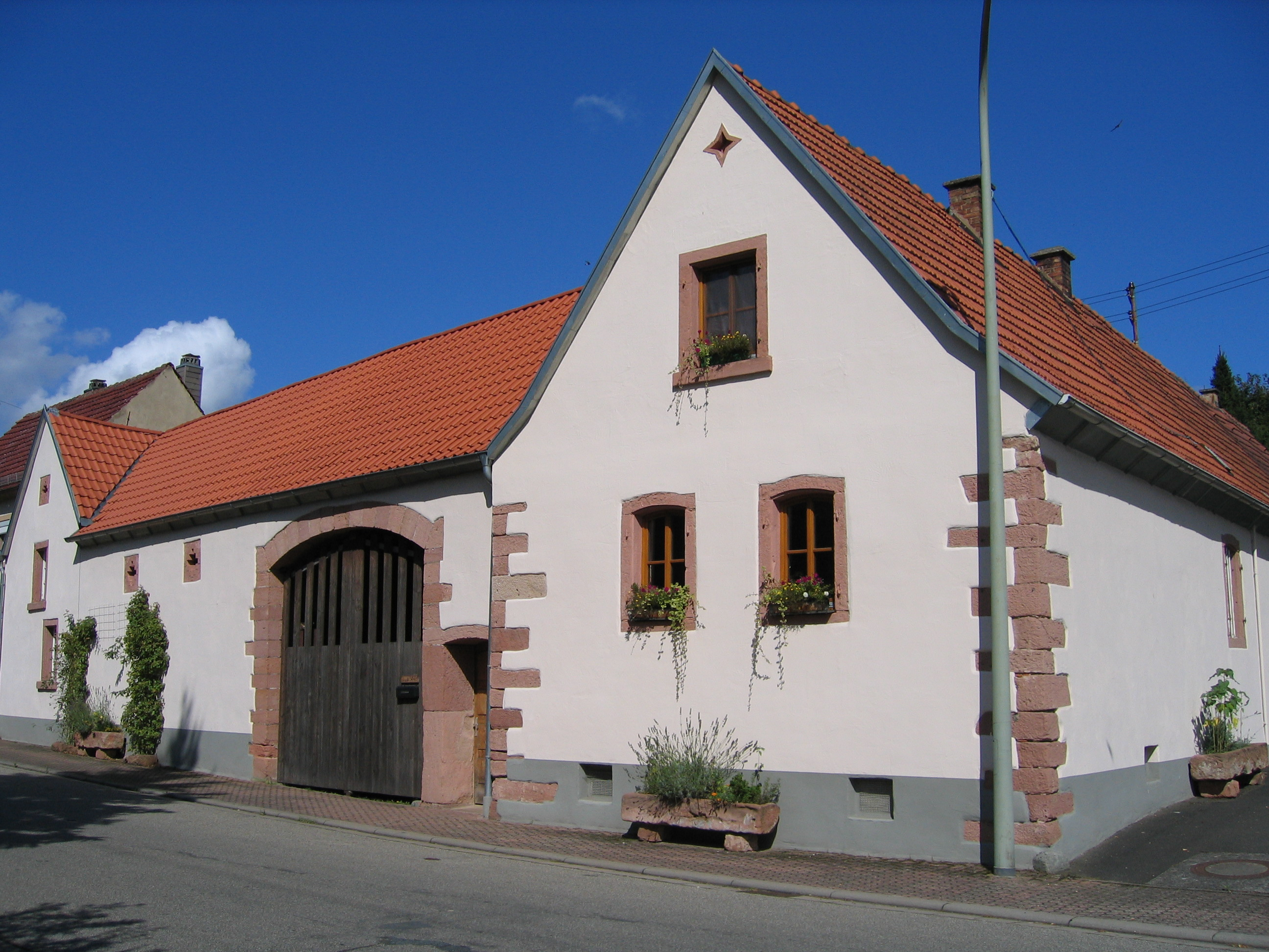 Ehemaliger Bauernhof in der Ortsmitte, Hauptstraße